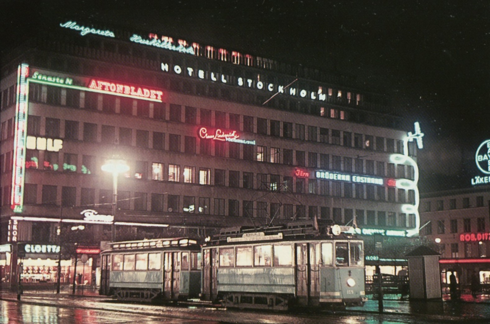 Norrmalmstorg med Citypalatset vid mitten av 1940-talet